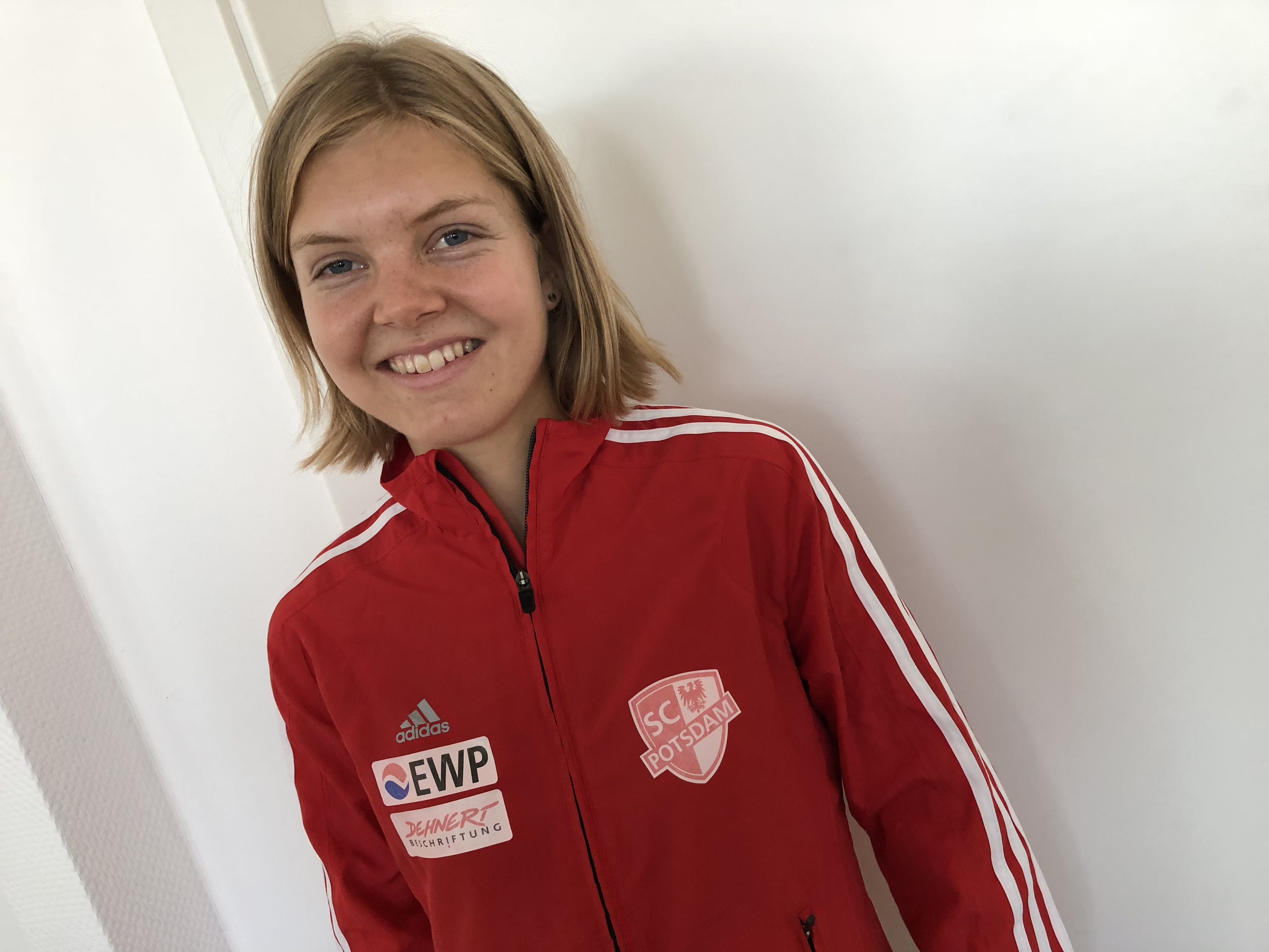 Saskia Feige, 2018